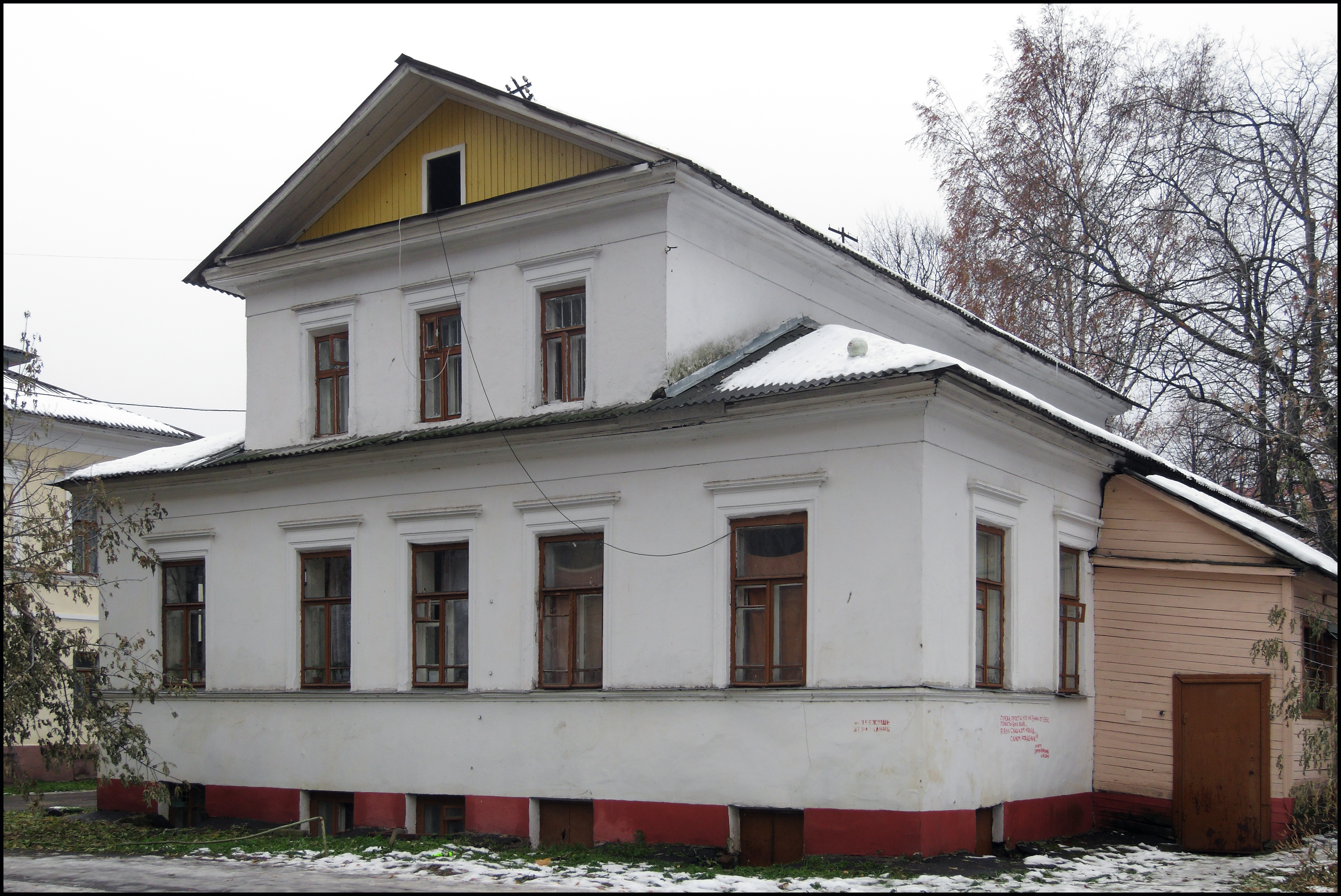 Усадьба Узденникова-Пошехонова (Ярославская область, Ярославль, Волкова улица, 3, 3-а)